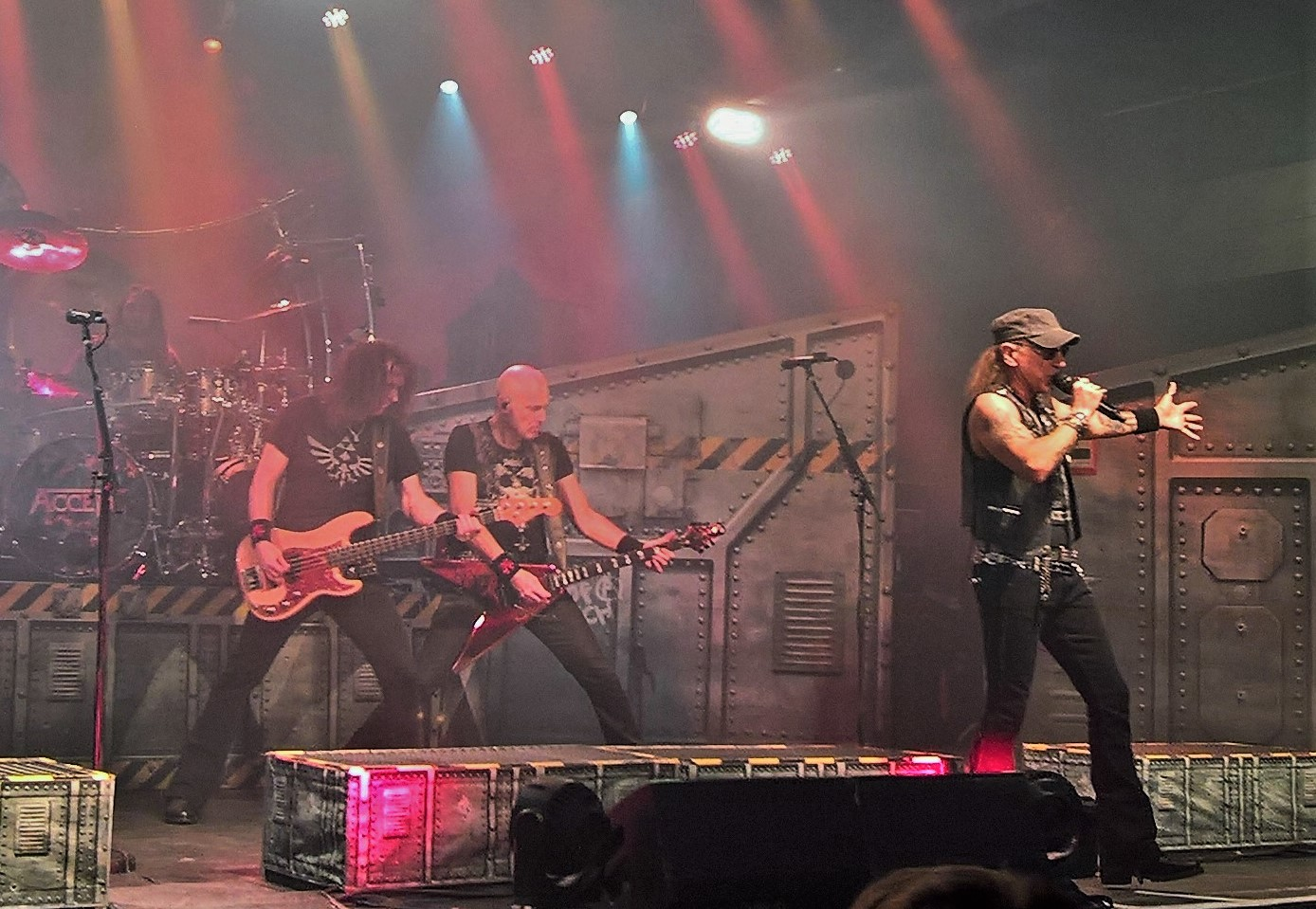 Accept ja laulaja Mark Tornillo keikalla Helsingissä 18.2.2018.